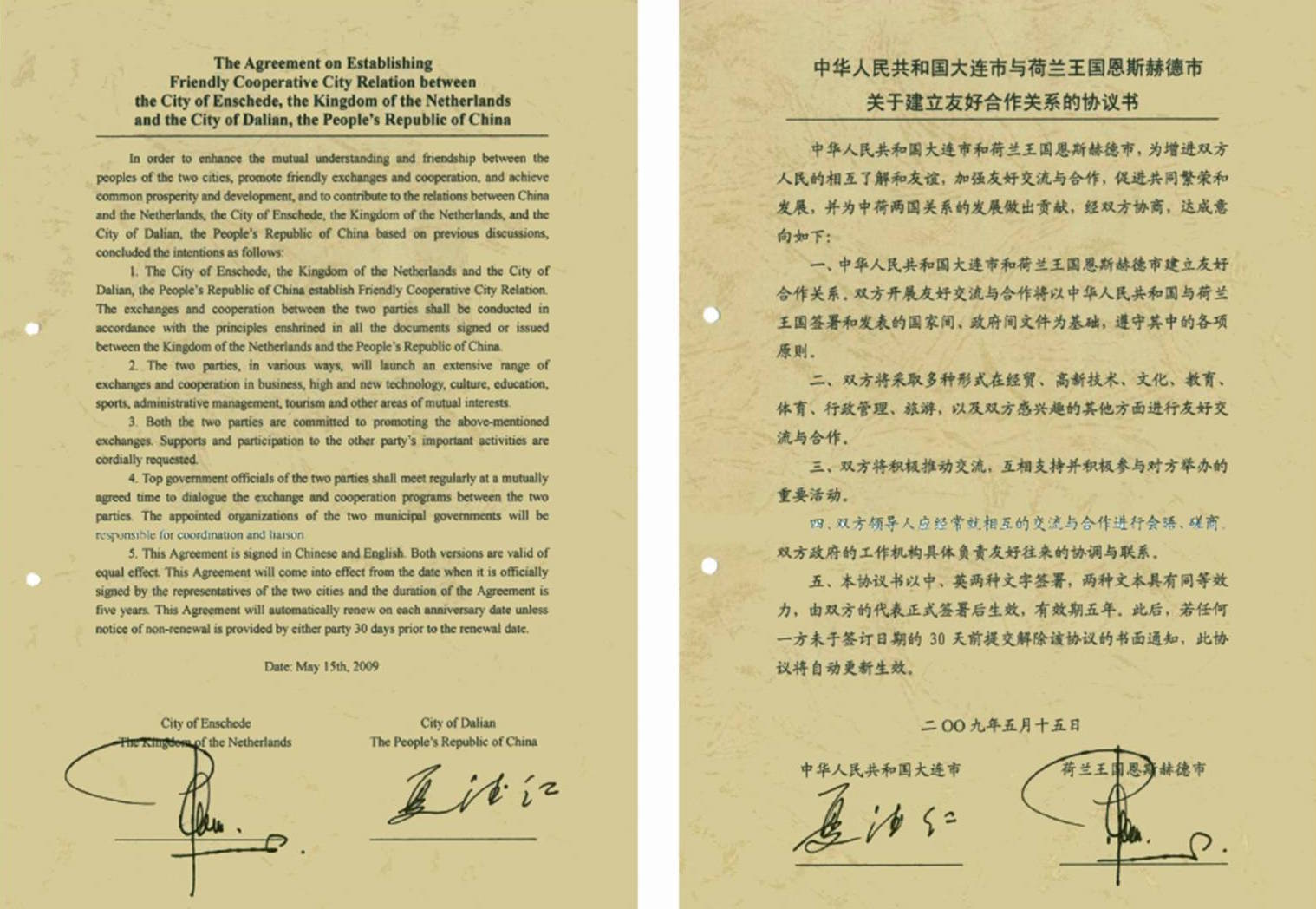 The Agreement on Establishing Friendly Cooperative City Relation between the City of Enschede, the Kingdom of the Netherlands and the City of Dalian, the People's Republic of China.